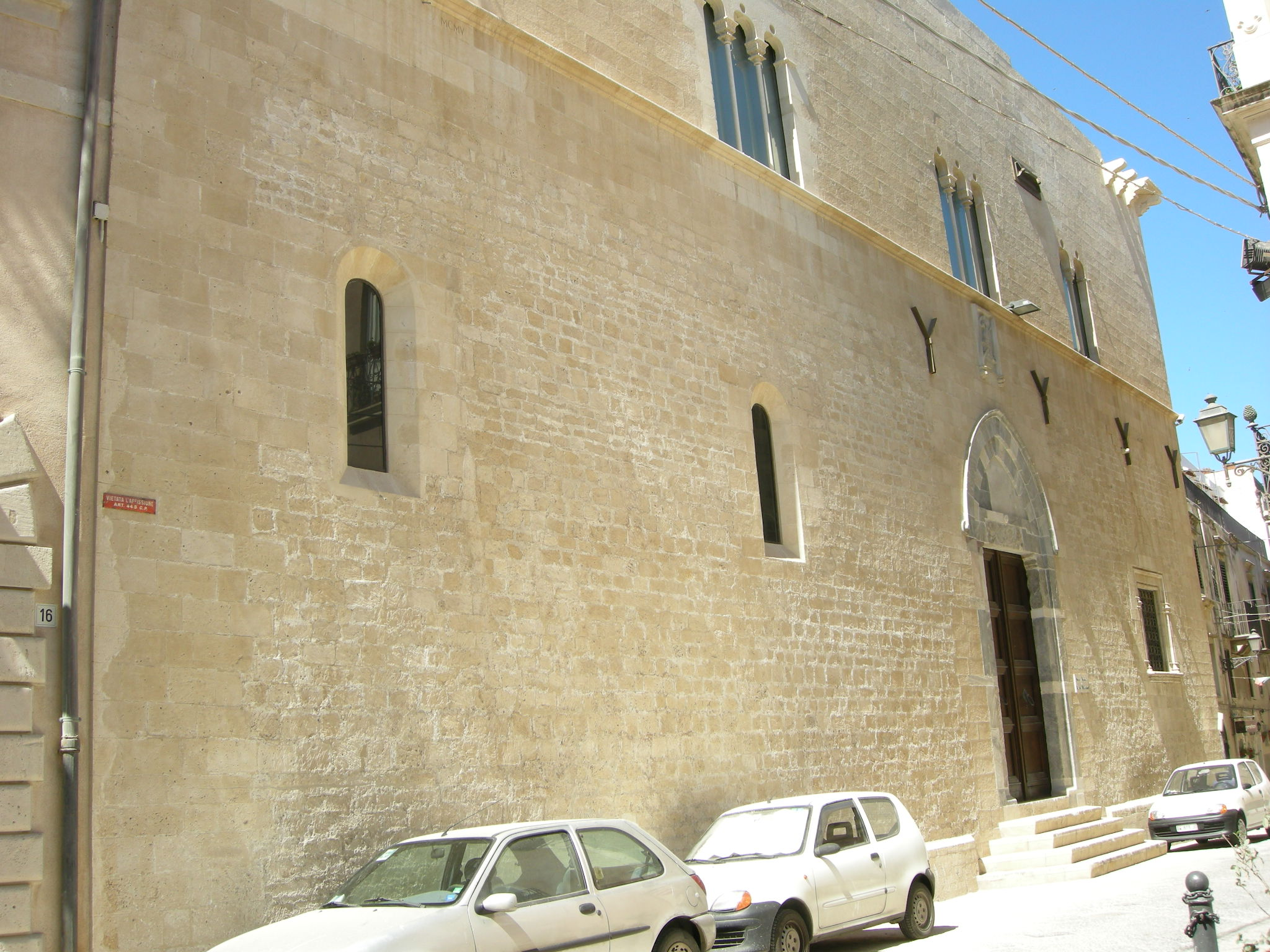 Ortigia, palazzo bellomo